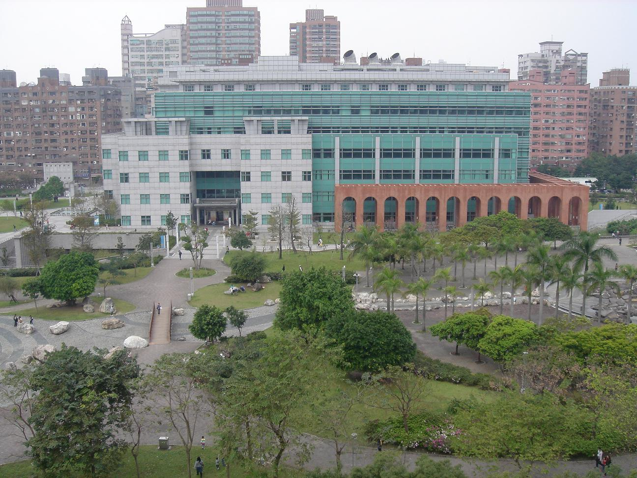 鳥瞰臺北縣中和市四號公園樂水區與國立臺灣圖書館。